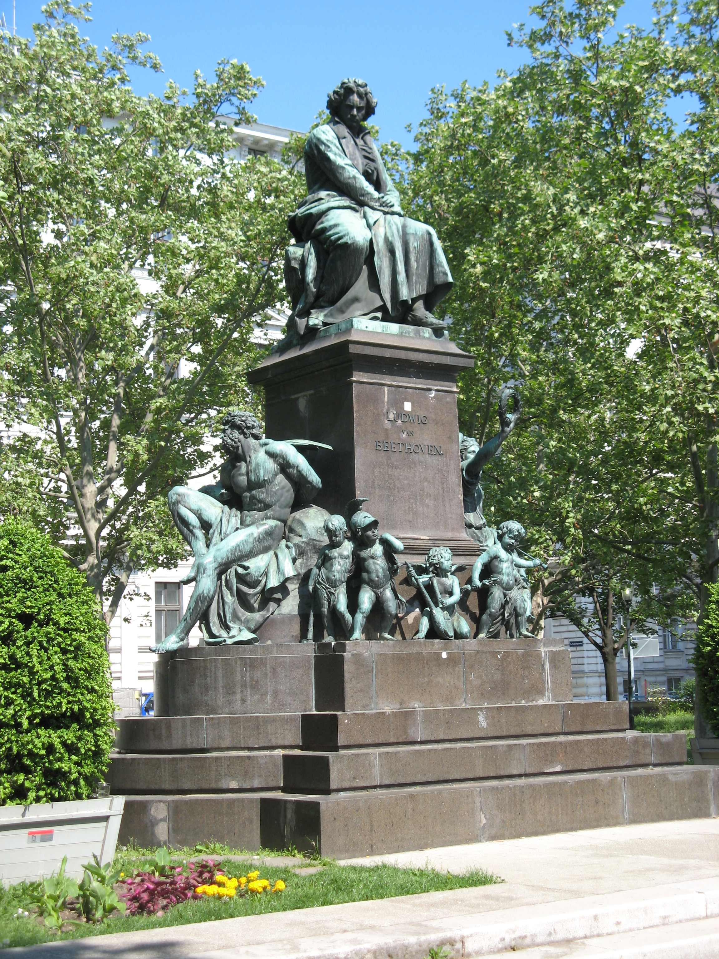 Beethoven-Denkmal von Kaspar von Zumbusch (1880) in Wien